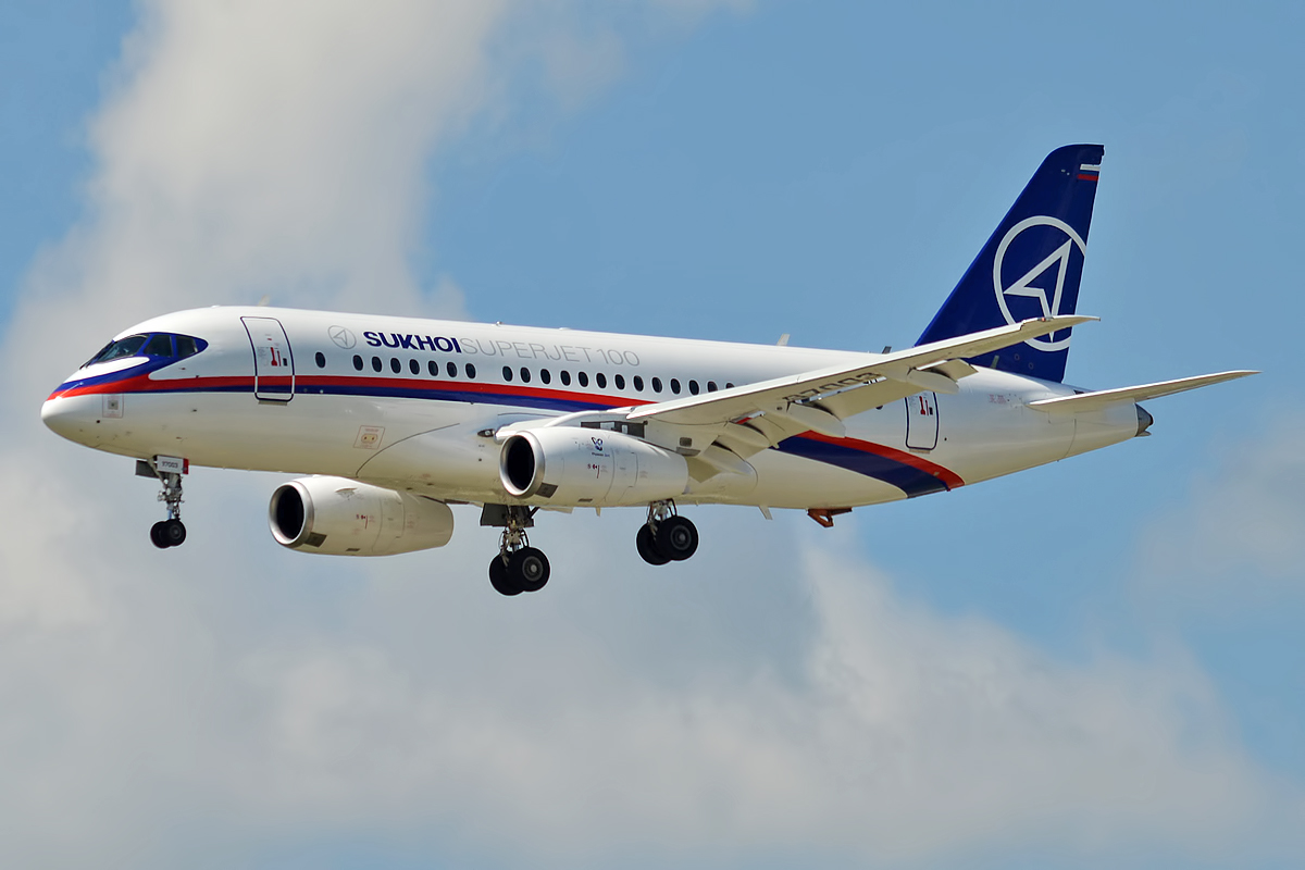 Sukhoi Design Bureau, RA-97003, Sukhoi Superjet 100-95